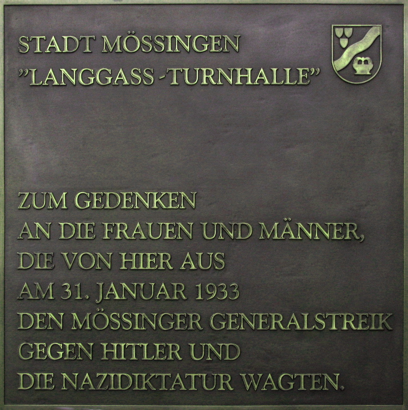 Die Langgass-Turnhalle in Mössingen mit Gedenktafel zum Mössinger Generalstreik gegen die Machtergreifung von Adolf Hitler. Die Halle wurde von den Streikwilligen am 30. und 31. Januar 1933 als Versammlungsort genutzt. Der Text der Inschrift auf der Gedenktafel lautet: STADT MÖSSINGEN LANGGASS-TURNHALLE" ZUM GEDENKEN AN DIE FRAUEN UND MÄNNER DIE VON HIER AUS AM 31. JANUAR 1933 DEN MÖSSINGER GENERALSTREIK GEGEN HITLER UND DIE NAZIDIKTATUR WAGTEN